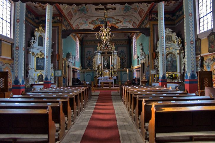 Śnieciska p.w. św. Marcina